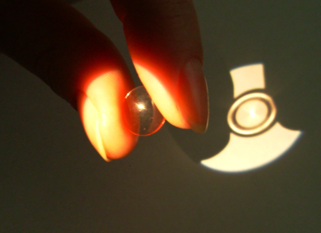 Ортокератологическая линза под светом